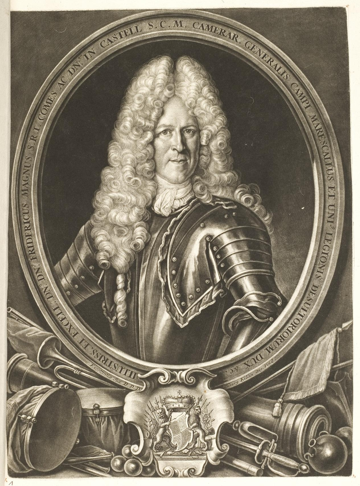 Grafik aus dem Klebeband Nr. 1 der Fürstlich Waldeckschen Hofbibliothek Arolsen Motiv: Friedrich Magnus von Castell-Remlingen, kaiserlicher Feldmarschall